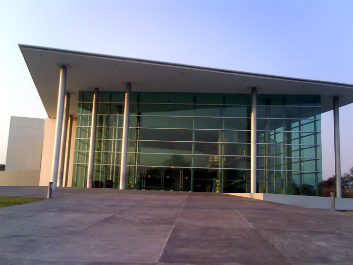 Salón Universitario.